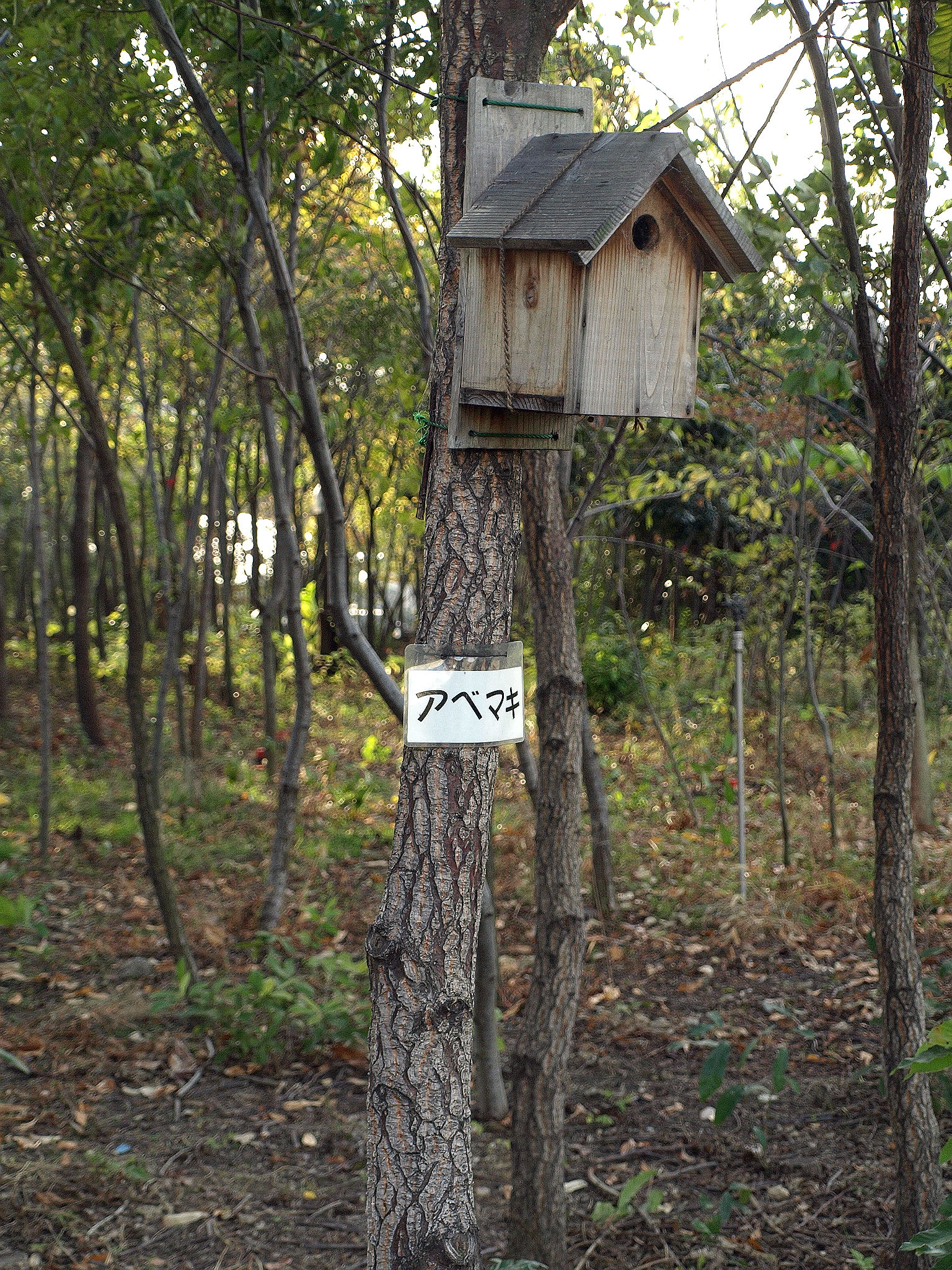 尼崎の森中央緑地 はじまりの森 アベマキ